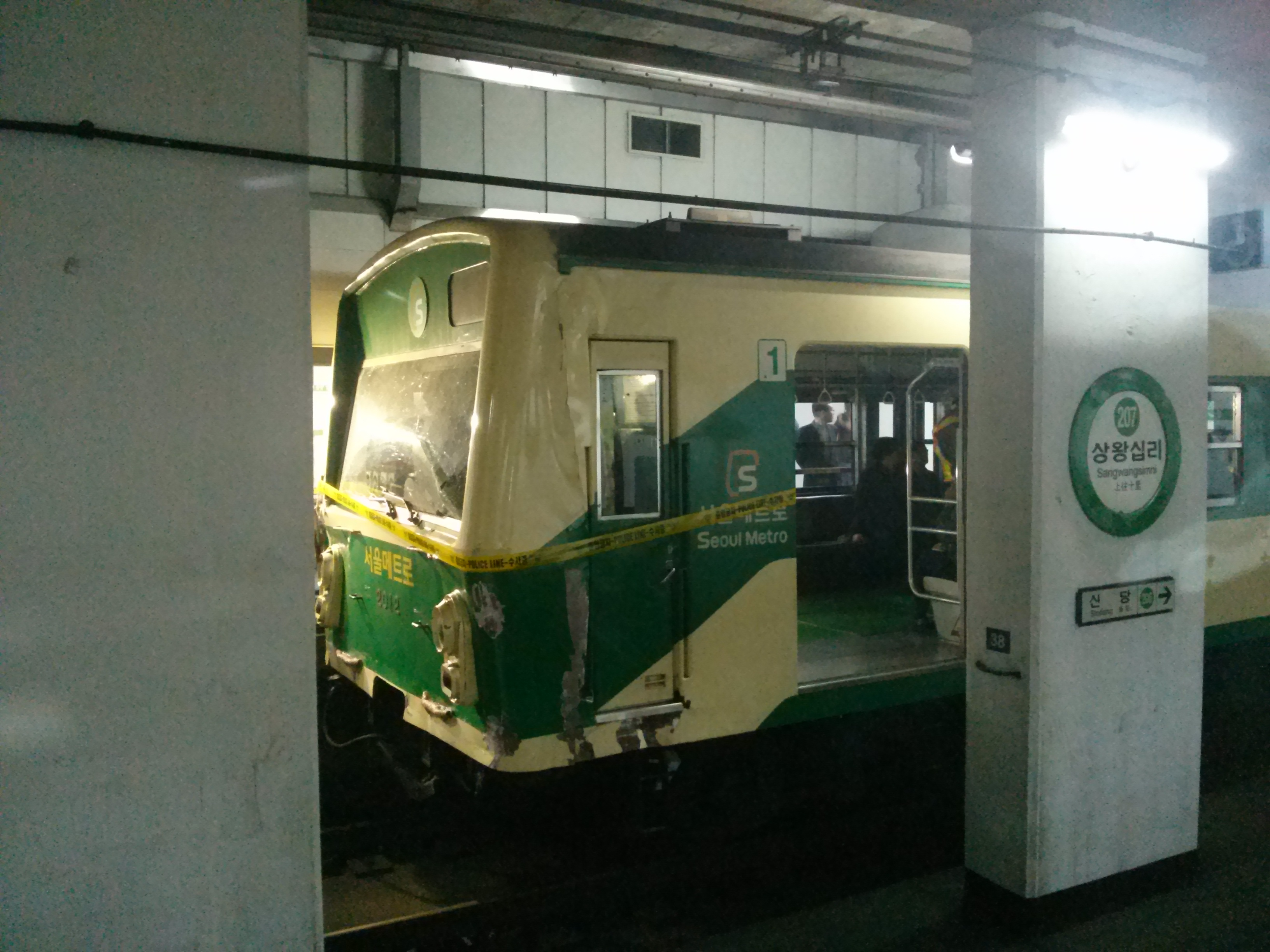 상왕십리역 전동차 추돌 사고 당시 충격으로 찌그러진 212편성 선두차(2012호).